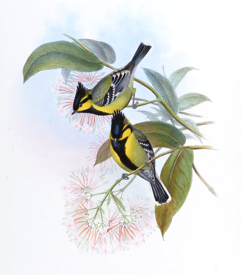 Parus jerdoni = Parus aplonotus